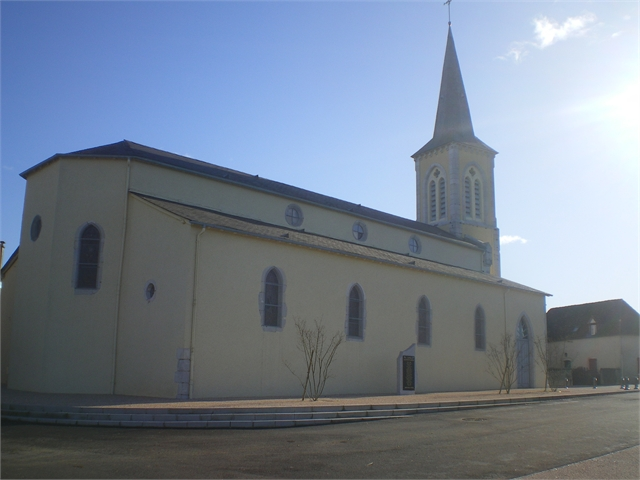 MESPLEDE eglise